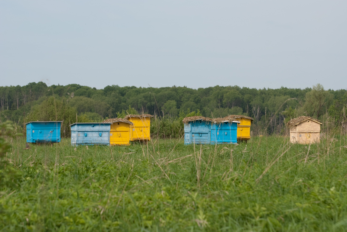 Ульи на пасеке расположенные «россыпью»